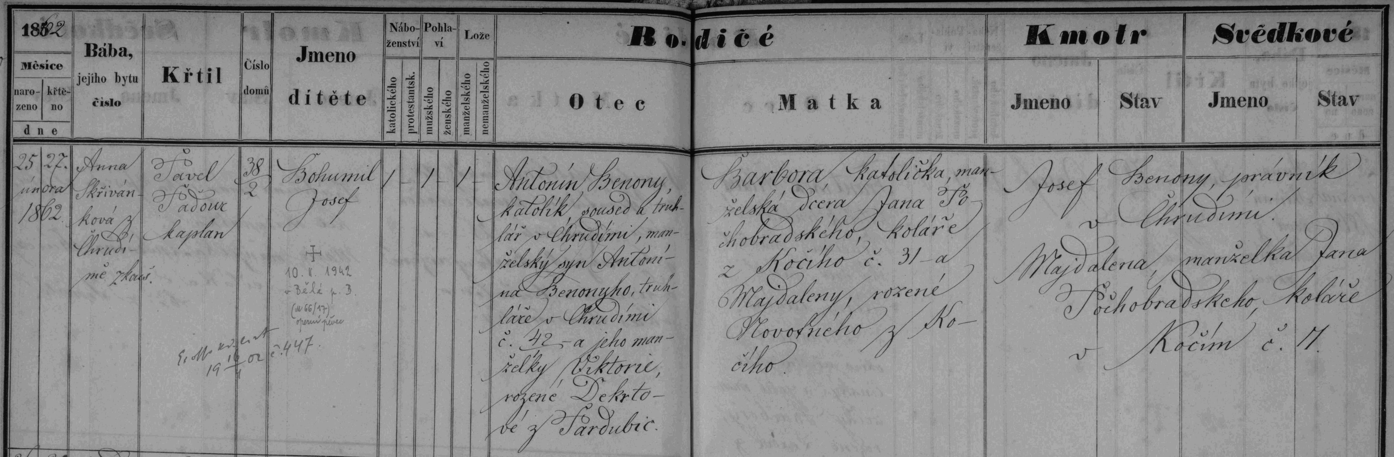 matriční záznam o narození a křtu Bohumila Benoniho 1862